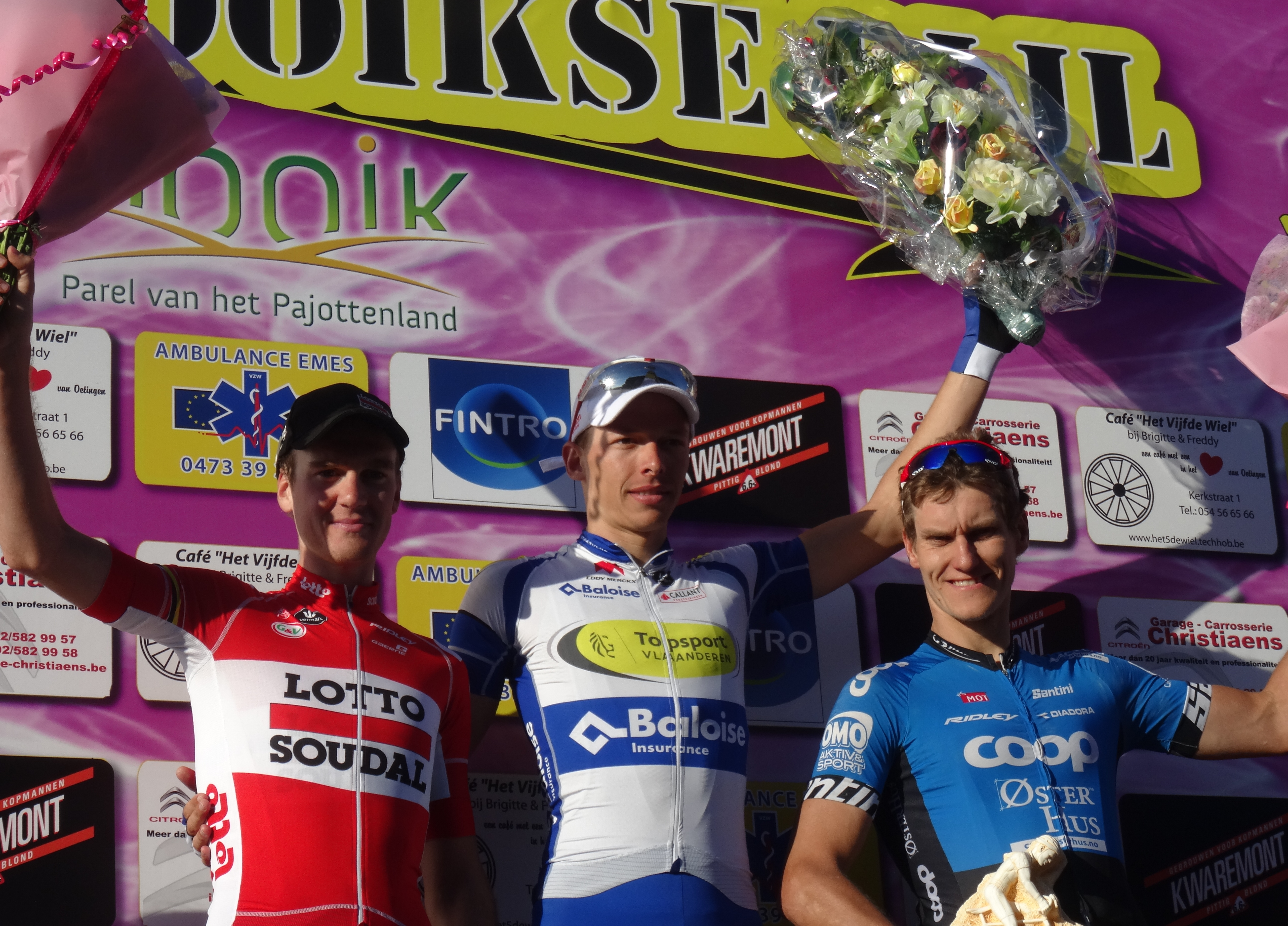 Reportage réalisé le dimanche 27 septembre à l'occasion du départ et de l'arrivée de la Gooikse Pijl 2015 à Gooik, Belgique.